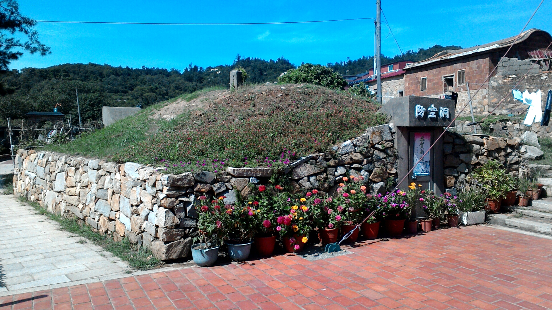 山后聚落防空洞,福建省金門縣金沙鎮三山里